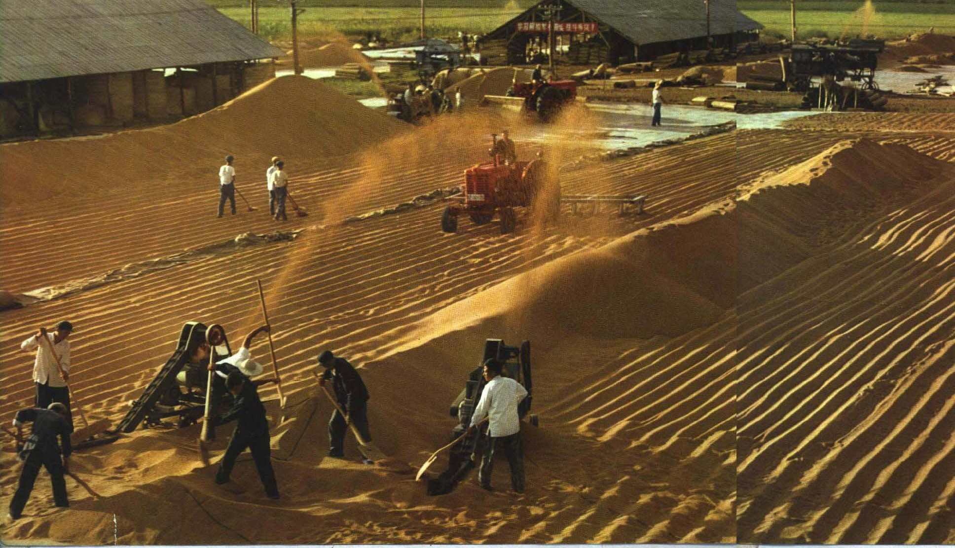 1964-12 1964年 三江平原北大荒国营五七九农场